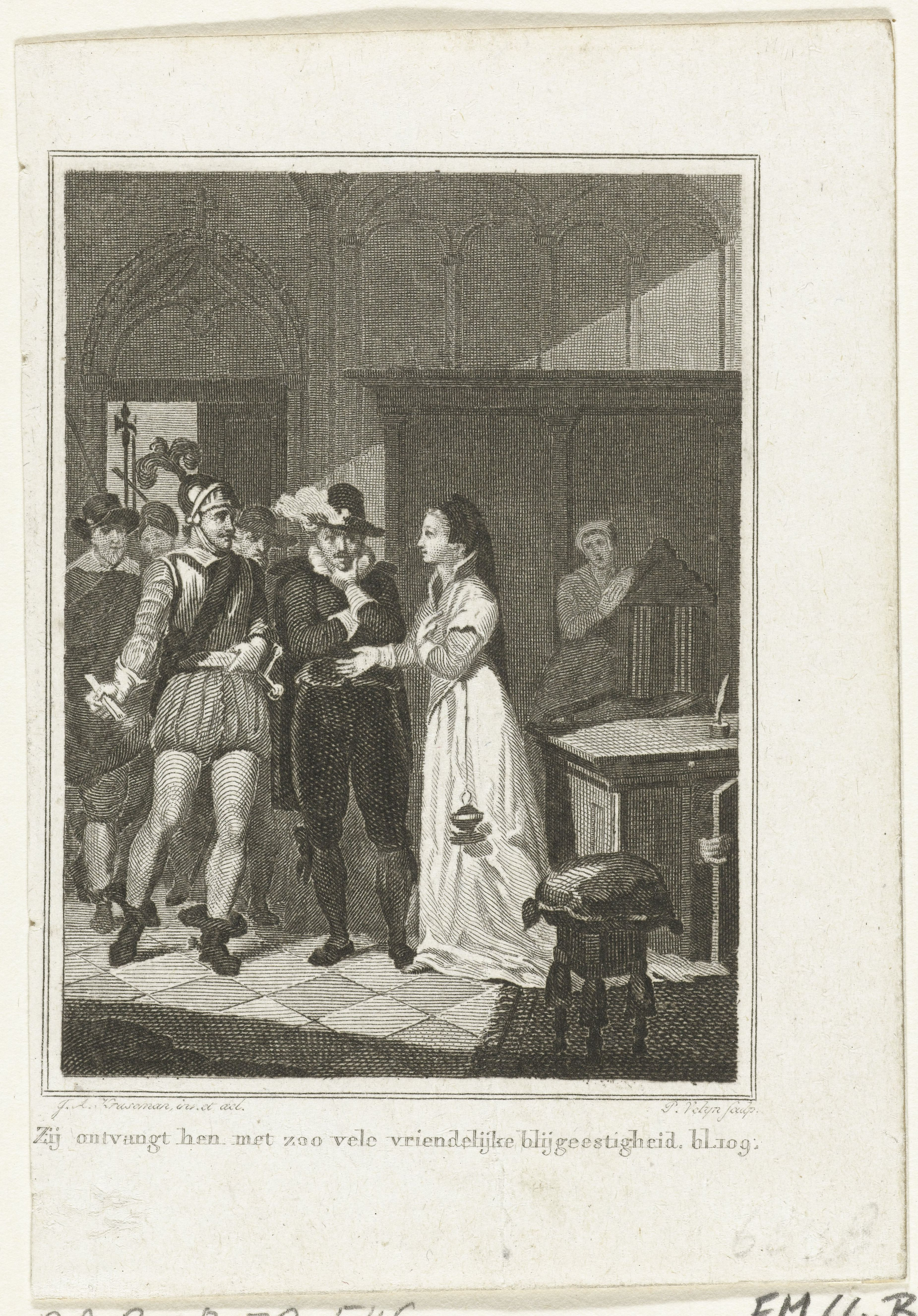 IdentificatieTitel(s): Margaretha Coppier verbergt soldaten van de prins in haar woning te Antwerpen, 1574Objecttype: prent historieprent Objectnummer: RP-P-OB-79.546Catalogusreferentie: FMH 664-BOpmerking: toegevoegd nummer RPKOmschrijving: Margaretha Coppier (ook bekend als Margaretha van Kalslagen) verbergt soldaten van de prins van Oranje in haar woning tijdens een poging van de prins om de stad per list te veroveren, 1574. Zij staat soldaten die een huiszoeking doen te woord.VervaardigingVervaardiger: prentmaker: Philippus Velijn (vermeld op object)naar tekening van: Jan Adam Kruseman (vermeld op object)Plaats vervaardiging: NederlandDatering: 1826 - 1828Fysieke kenmerken: etsMateriaal: papier Techniek: etsenAfmetingen: blad: h 113 mm × b 79 mmToelichtingIllustratie afkomstig uit: Almanak voor het schoone en goede voor 1828, G.J.A. Beijerinck, Amsterdam.OnderwerpWat: persecuted believers (hiding), e.g. Huguenots, Pilgrim FathersTachtigjarige OorlogWanneer: 1574 - 1574Waar: AntwerpenWie: Margaretha CoppierVerwerving en rechtenVerwerving: onbekendCopyright: Publiek domein